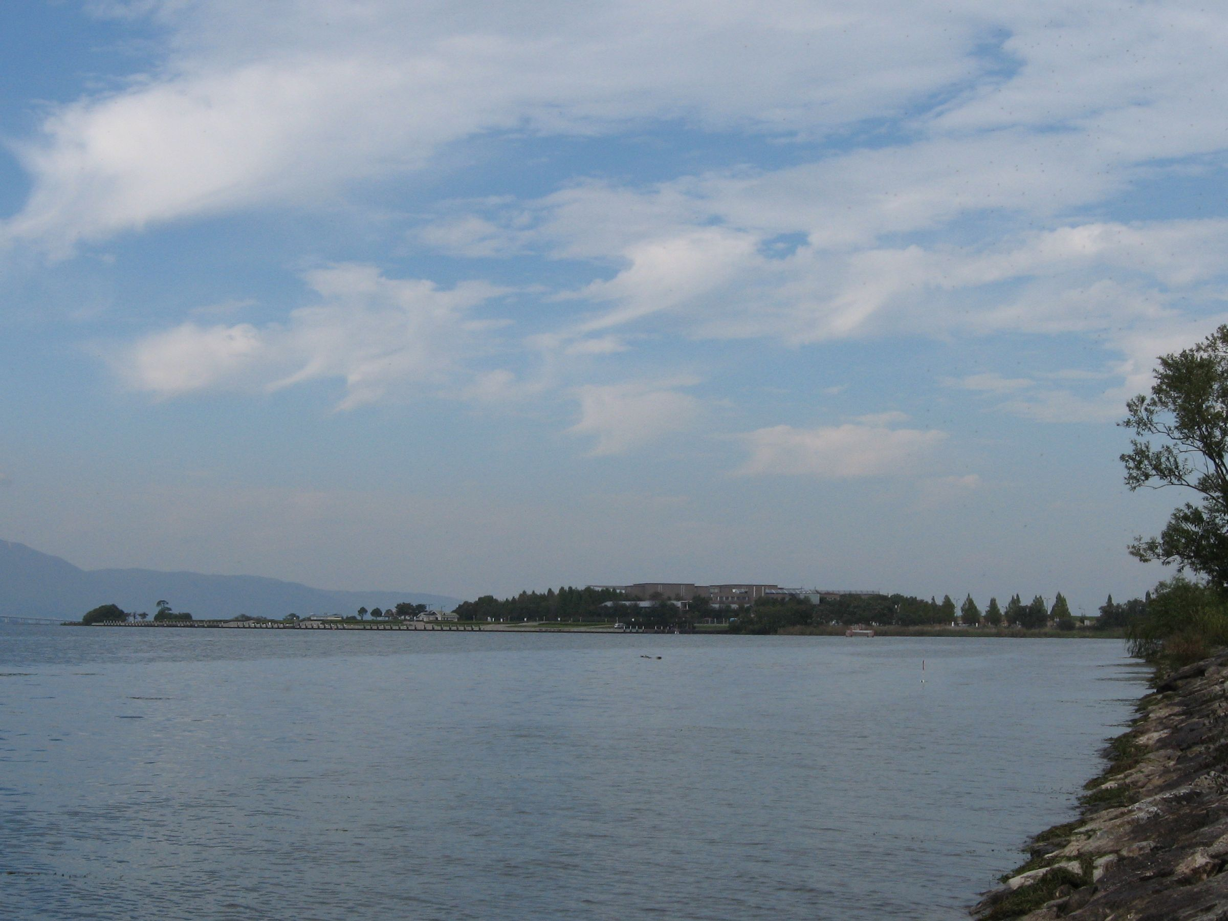 Karasuma Peninsula（烏丸半島）, in Lake Biwa, Kusatsu, Shiga.